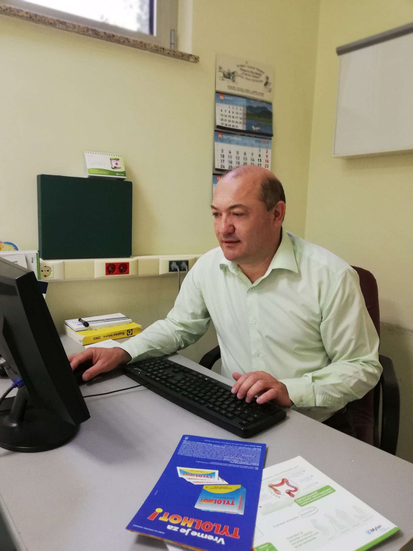 Miroslav Davidov